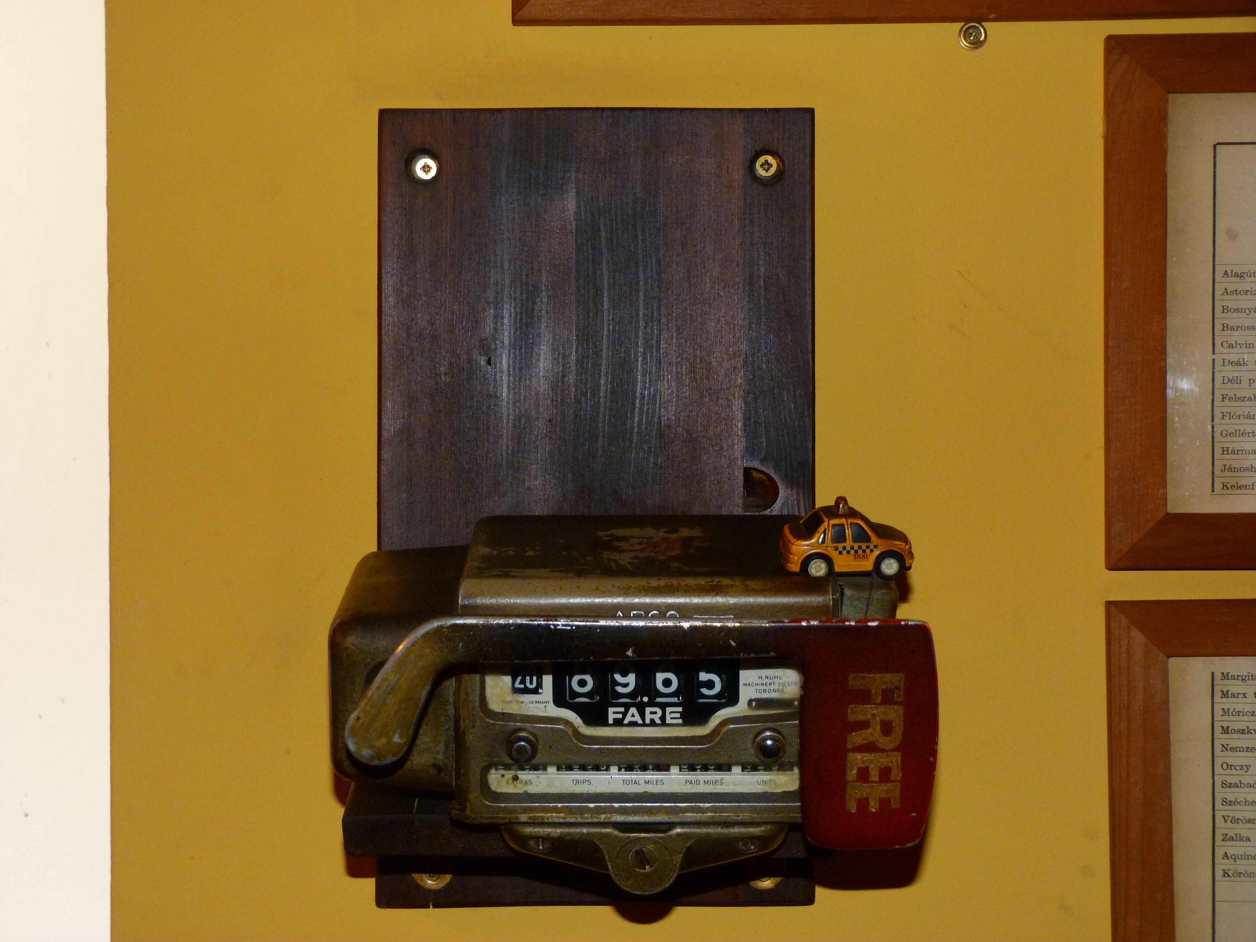 A felvétel 2015. február 4-én szerdán készült Budapesten, a Belvárosban. Nádor utca 34 szám, Tulipán Presszó. Telefon: 1/265-9043 A belvárosi nagy cégek, TV, a rendszerváltás óta bankok, Parlament árnyékában meghúzódó presszó a belvárosiak titkos találkahelye. Árai közepesek, a hosszabb időre itt megpihenőket, megbeszéléseiket tartókat szívesen látják. A falakon régi taxiórák, taxis képek. Régen a közelben a magyarországi autóközlekedés szocialista fellegvára, az 1.számú AKÖV (Autóközlekedési Vállalat) a Tüköry utcában. A taxisok törzshelye, droszt. Szocialista retró berendezése több évtizedes gyűjtés. Most eladásra hírdeti a Terv Presszóval közös tulajdonosa. ©© Derzsi Elekes Andor, Budapest, 2015, Published in the Metapolisz DVD line. You are authorised to use this photo under Creative Commons – even for commercial, for profit purposes. The vid must be attributed to Derzsi Elekes Andor. All of the photos and vids in the Metapolisz DVD line are under Creative Commons and can be used even for commercial – for profit – purposes. Recommended Citation Derzsi Elekes Andor: Metapolisz DVD line Források